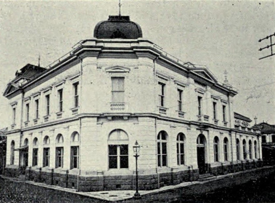 東京ガス本社